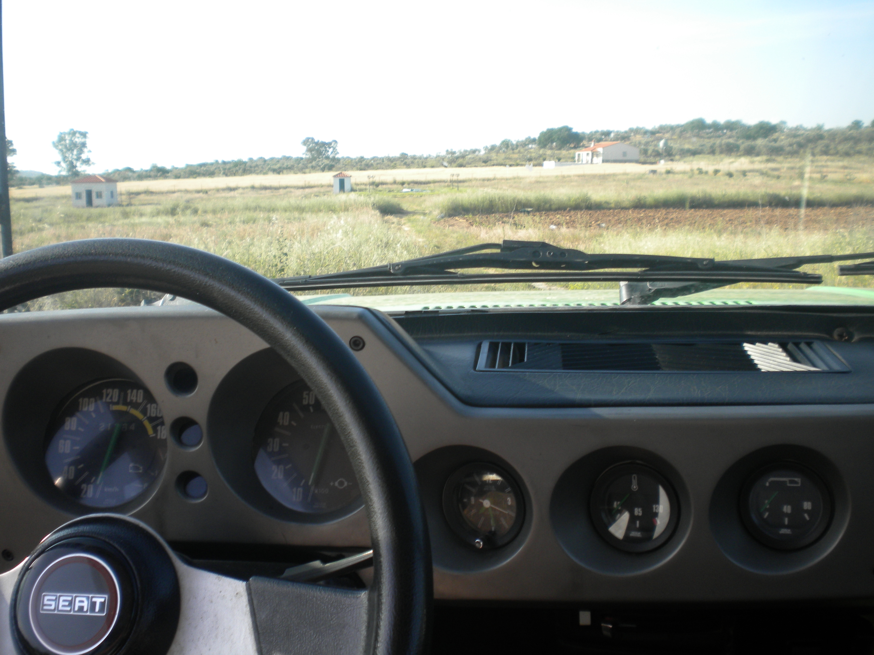 Equipado y bello cuadro de instrumentos diseñado también por Sessano, de lo mejor de su época dentro de su segmento.